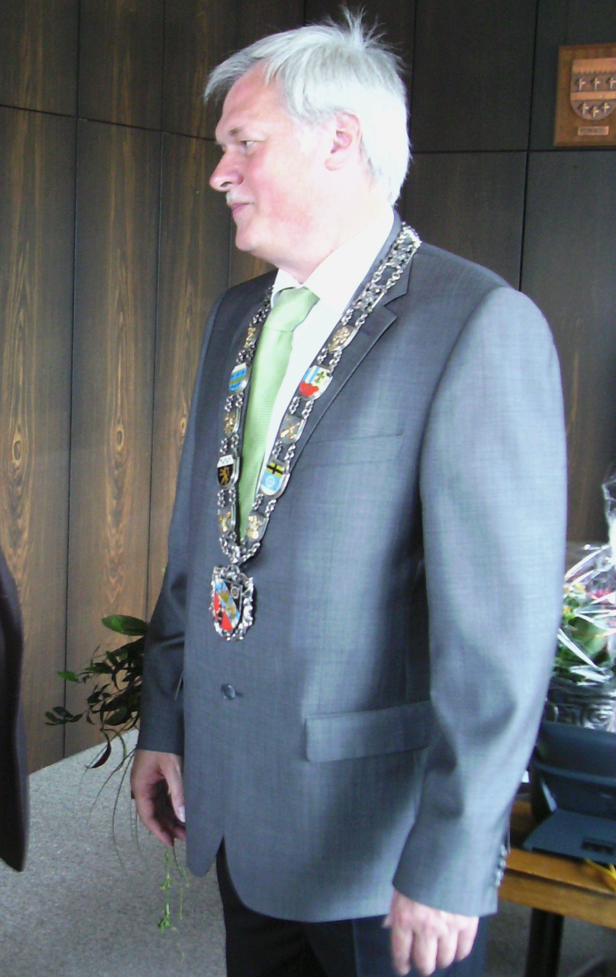 Amtseinführung des neuen St. Ingerter OB Hans Wagner am 5. Juli 2012